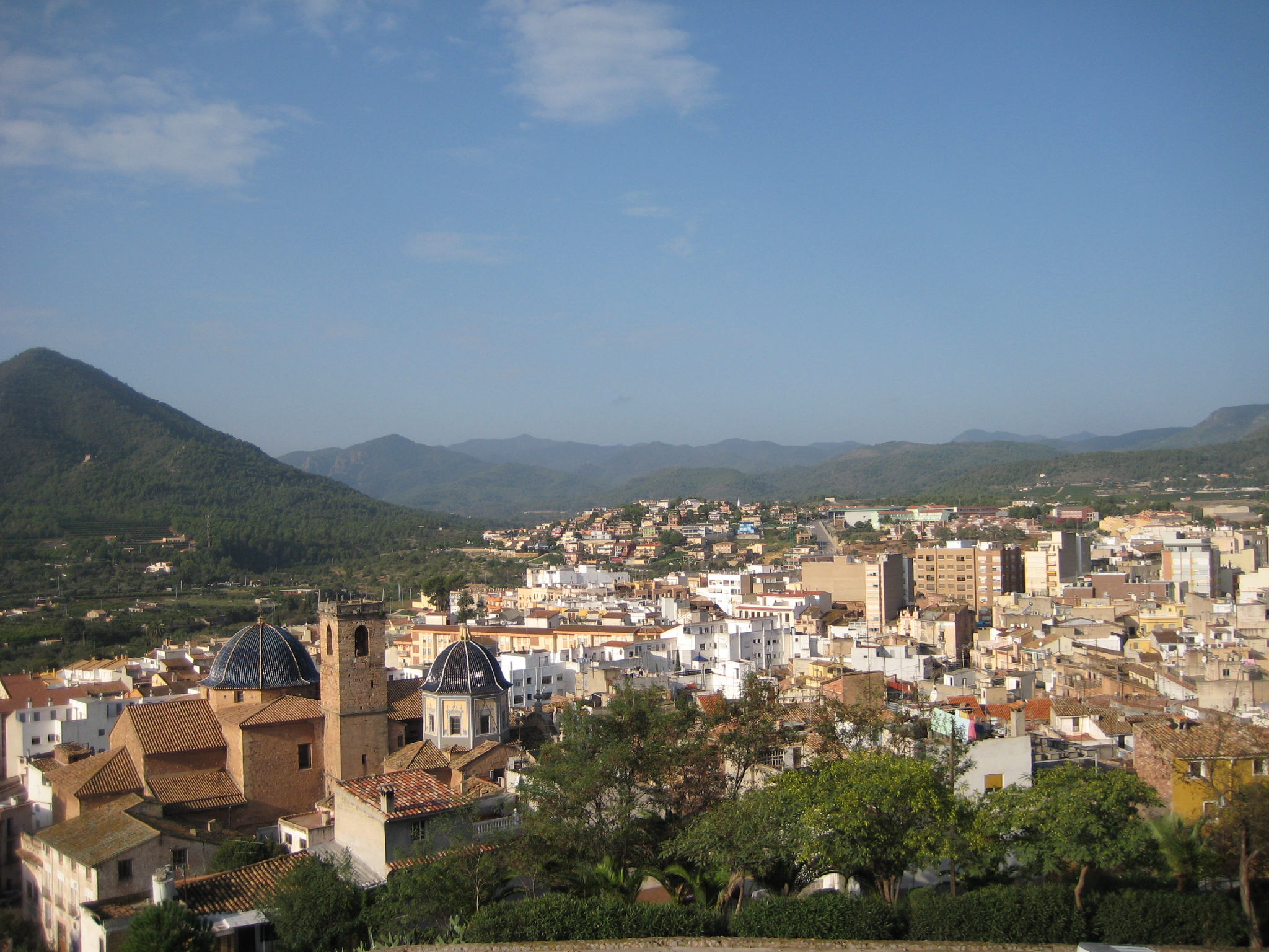 Panoràmica d'Onda, des del Castell